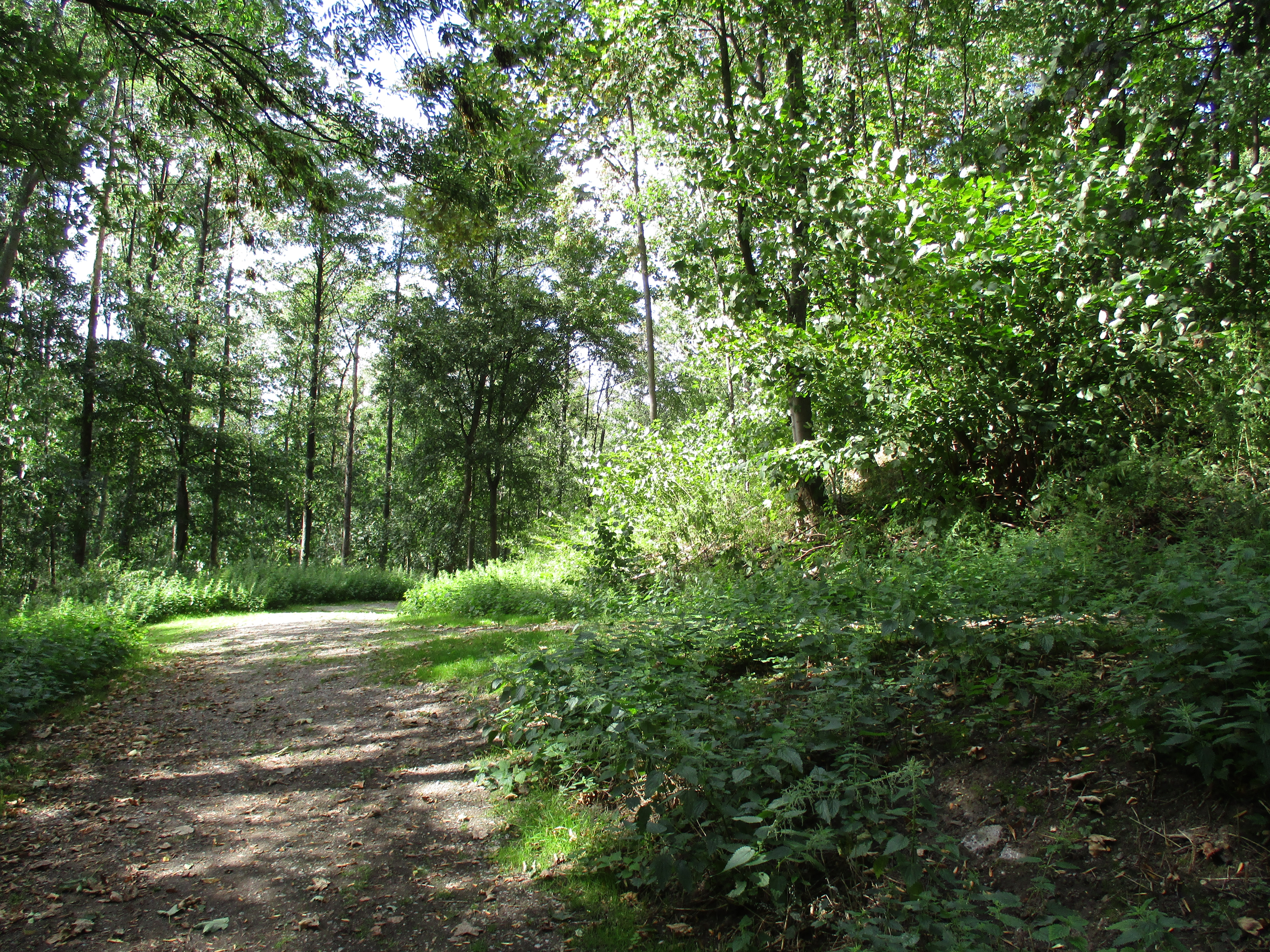 Panzerbau III war eine Rüstungsschmiede der Firma Krupp während dem 2. Weltkrieg in Essen-Borbeck. Dort wurden Zulieferteile für den Tigerpanzer gefertigt. Heute befindet sich auf der Fläche ein kleines Naherholungsgebiet. Hier und da entdeckt man heute noch Fundamentreste der ehemaligen Panzerfabrik.